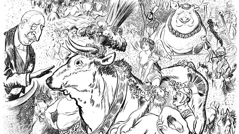 Le Bœuf Gras 1896 salué par Félix Faure et vu par Caran d'Ache - Détail d'un plus grand dessin en couleurs paru en 1896.